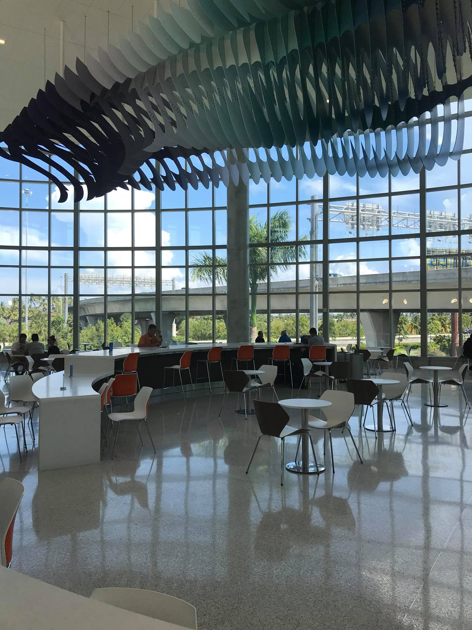 Sala d'attesa dell'Aeroporto Internazionale di Fort Lauderdale-Hollywood